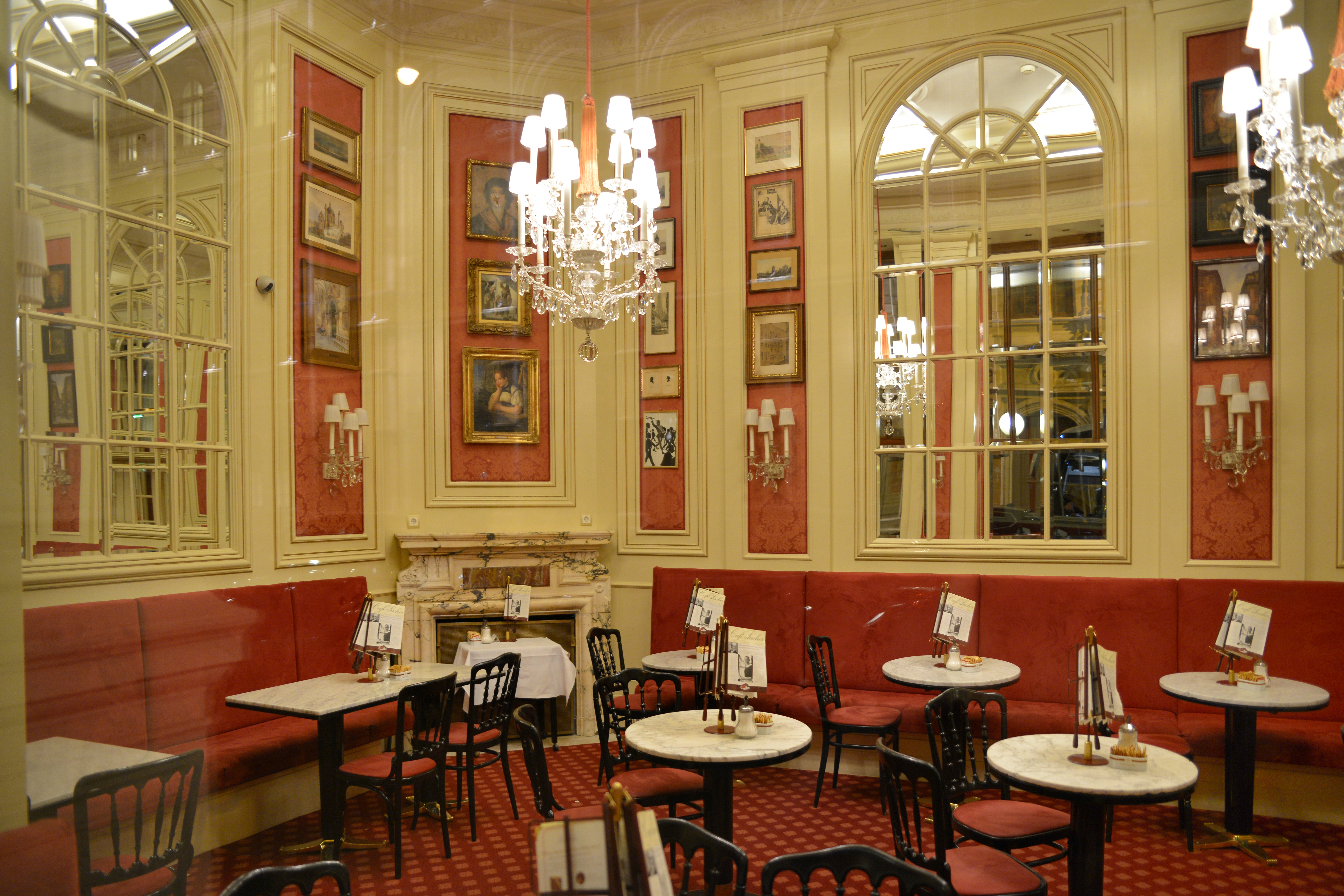 Wien, Cafe Sacher im Hotel Sacher.